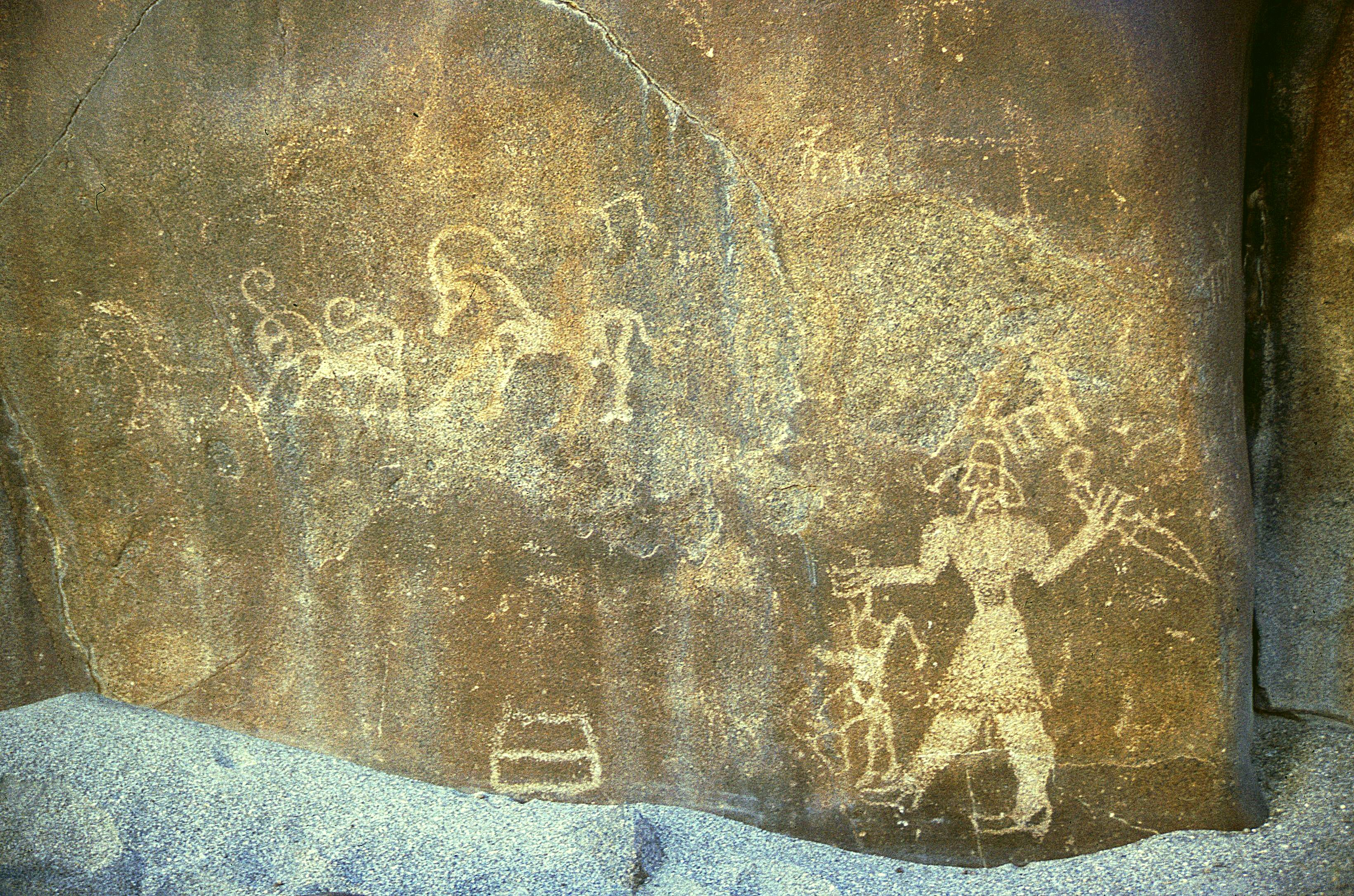 Felsbilder am Karakorum Highway: westiranisch-skisches Motiv